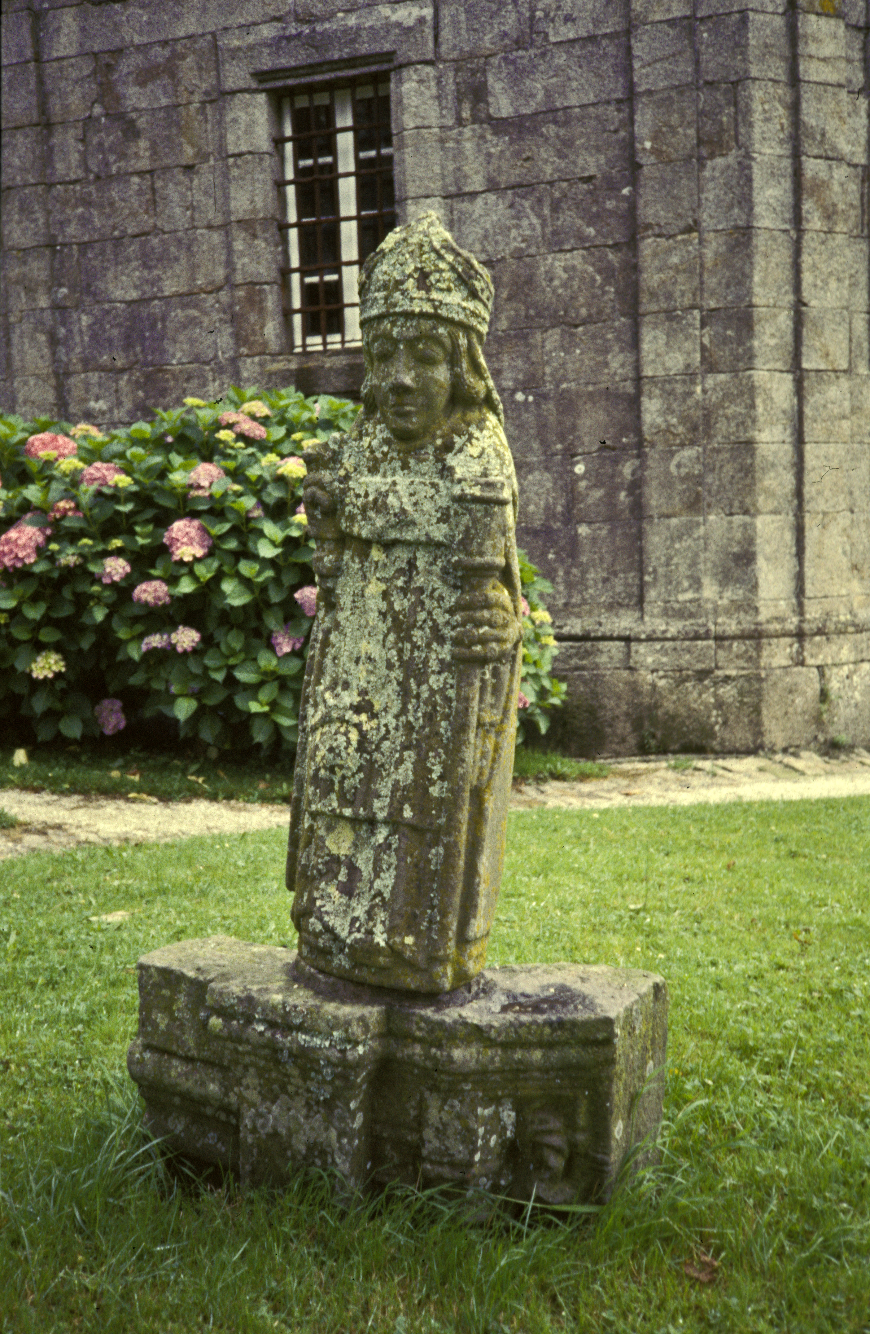 Statue de Saint-Suliau. Enclos paroissial de Sizun (Finistère).